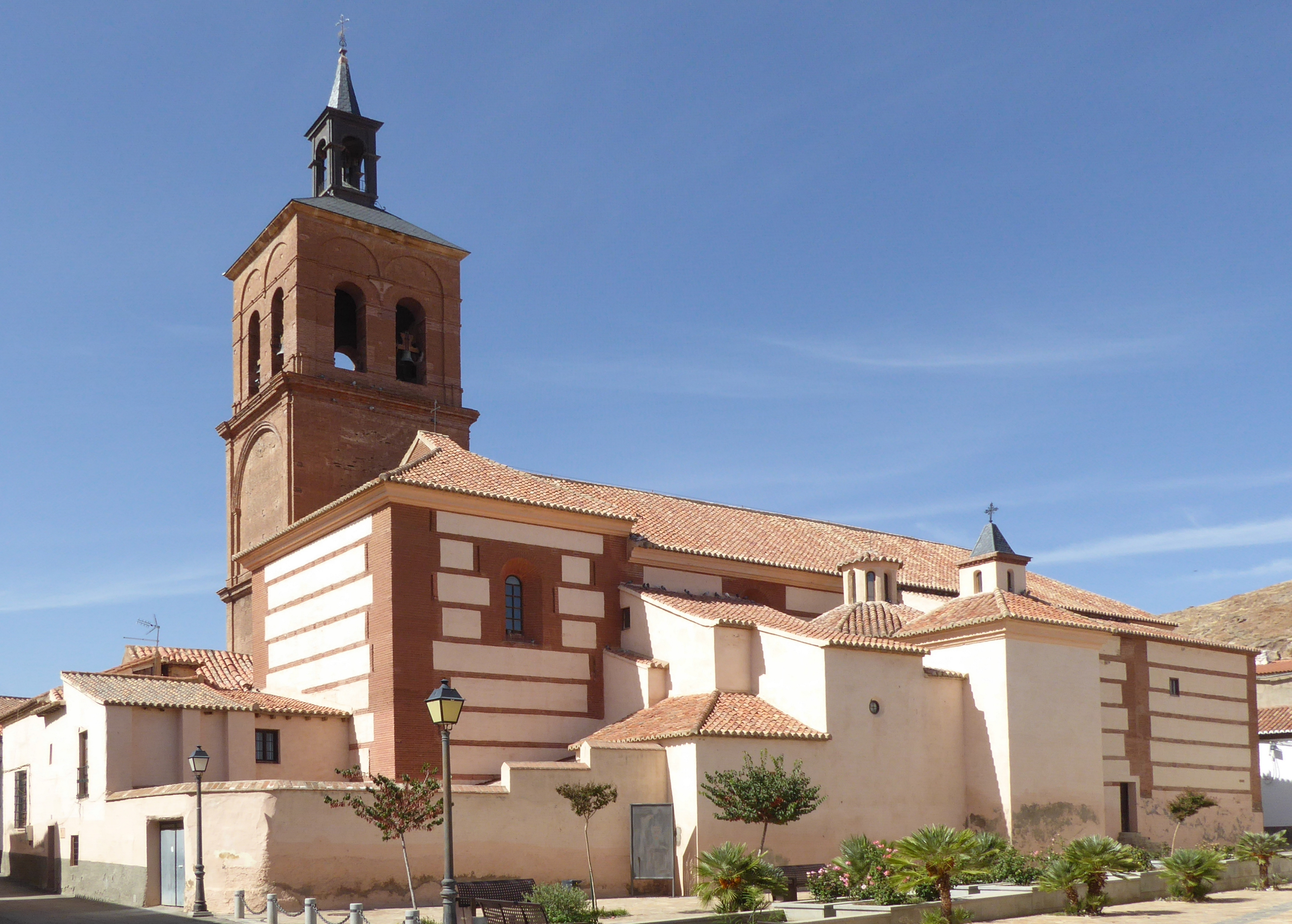 La Calahorra mit der im Zentrum befindlichen Kirche Iglesia de Nuestra Señora de la Anunciación, die auf das Jahr 1546 zurückgeht und auf Architektur im hispanischen Mudéjar-Stil reflektiert. - Andalusien Spanien Foto Wolfgang Pehlemann P1110130